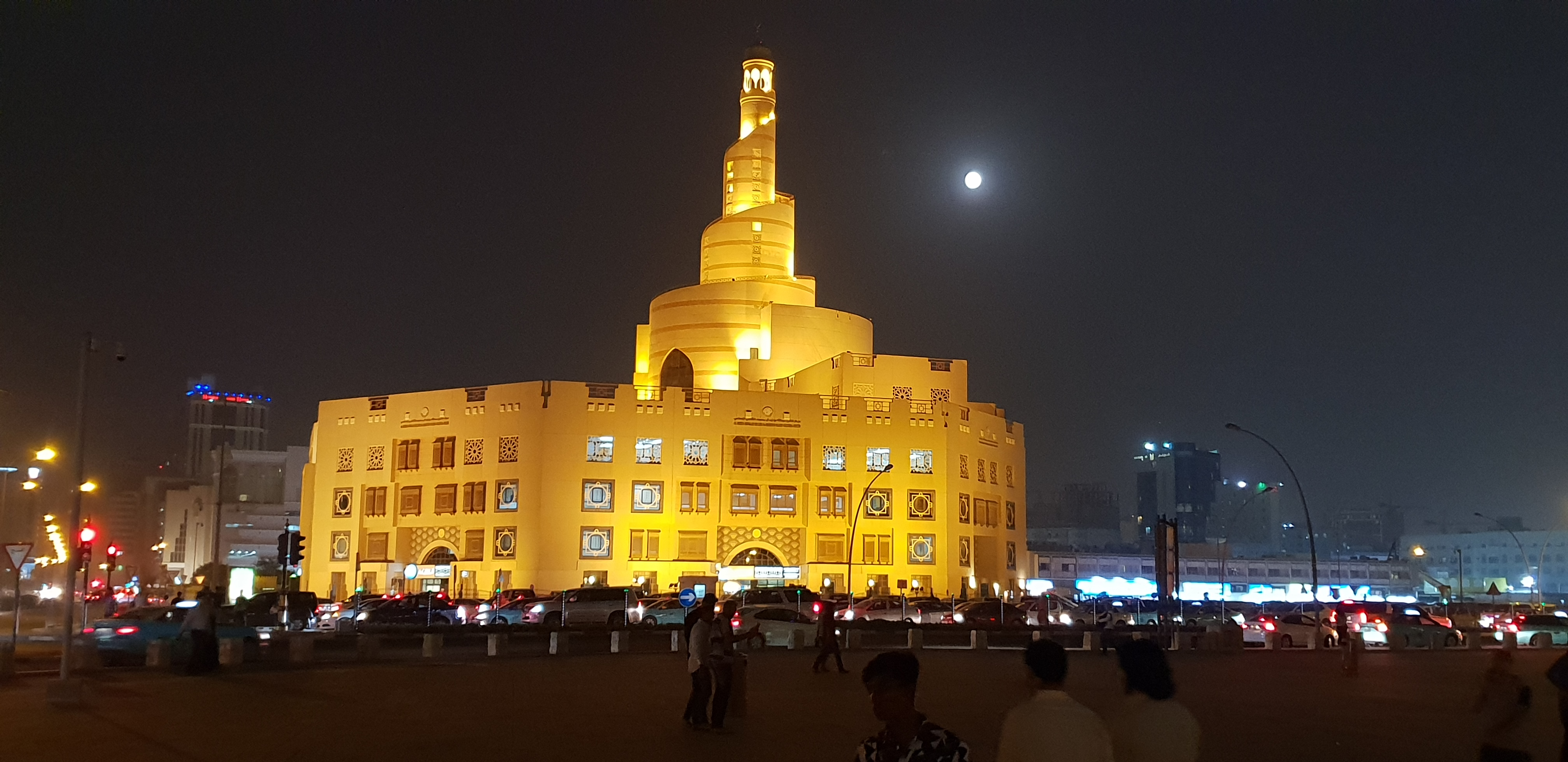 lunar eclipse